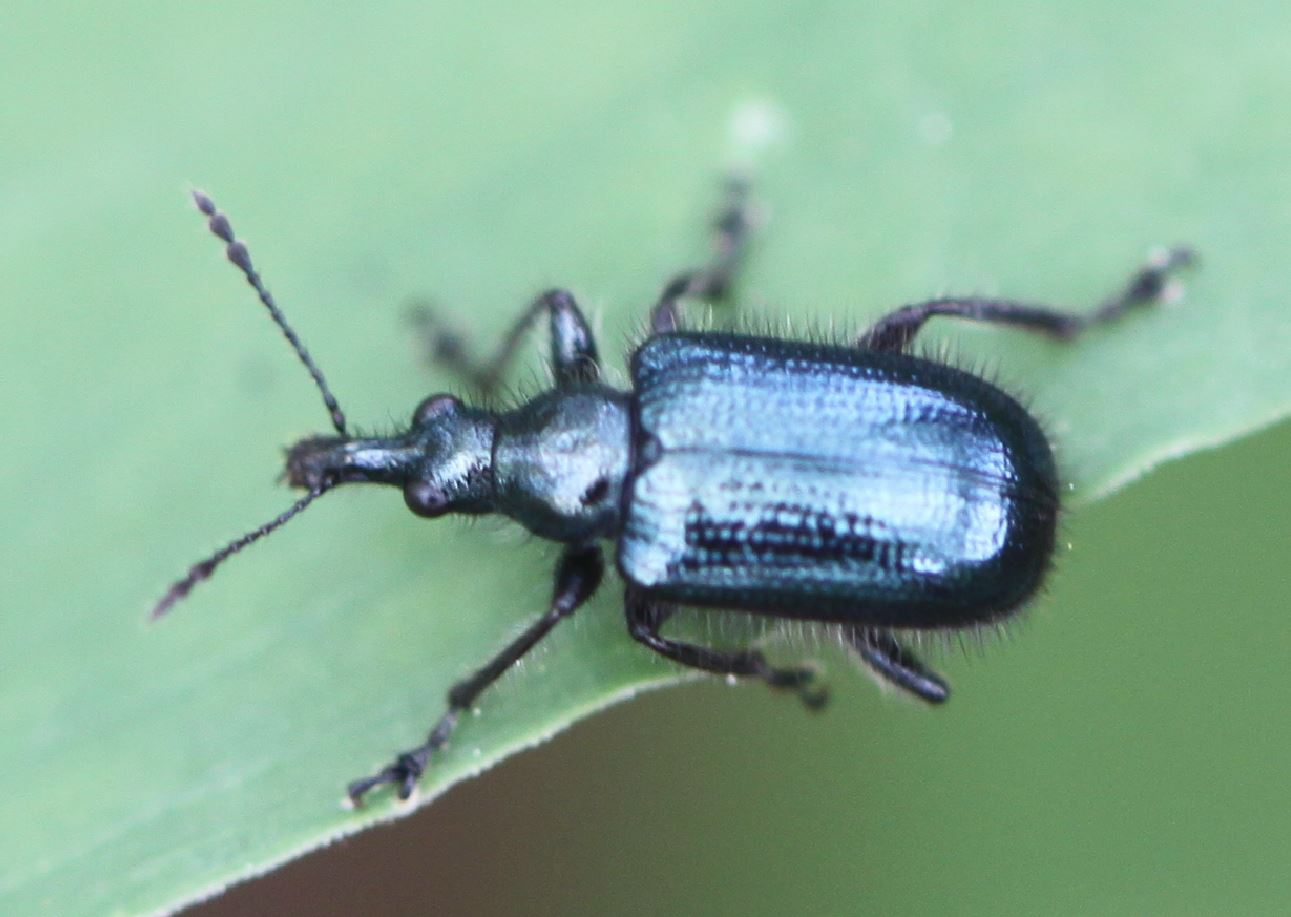 Lasiorhynchites cf. sericeus, am 9. April 2019 auf einem Bärlauchblatt in einem Wald nahe Walldorf/Baden